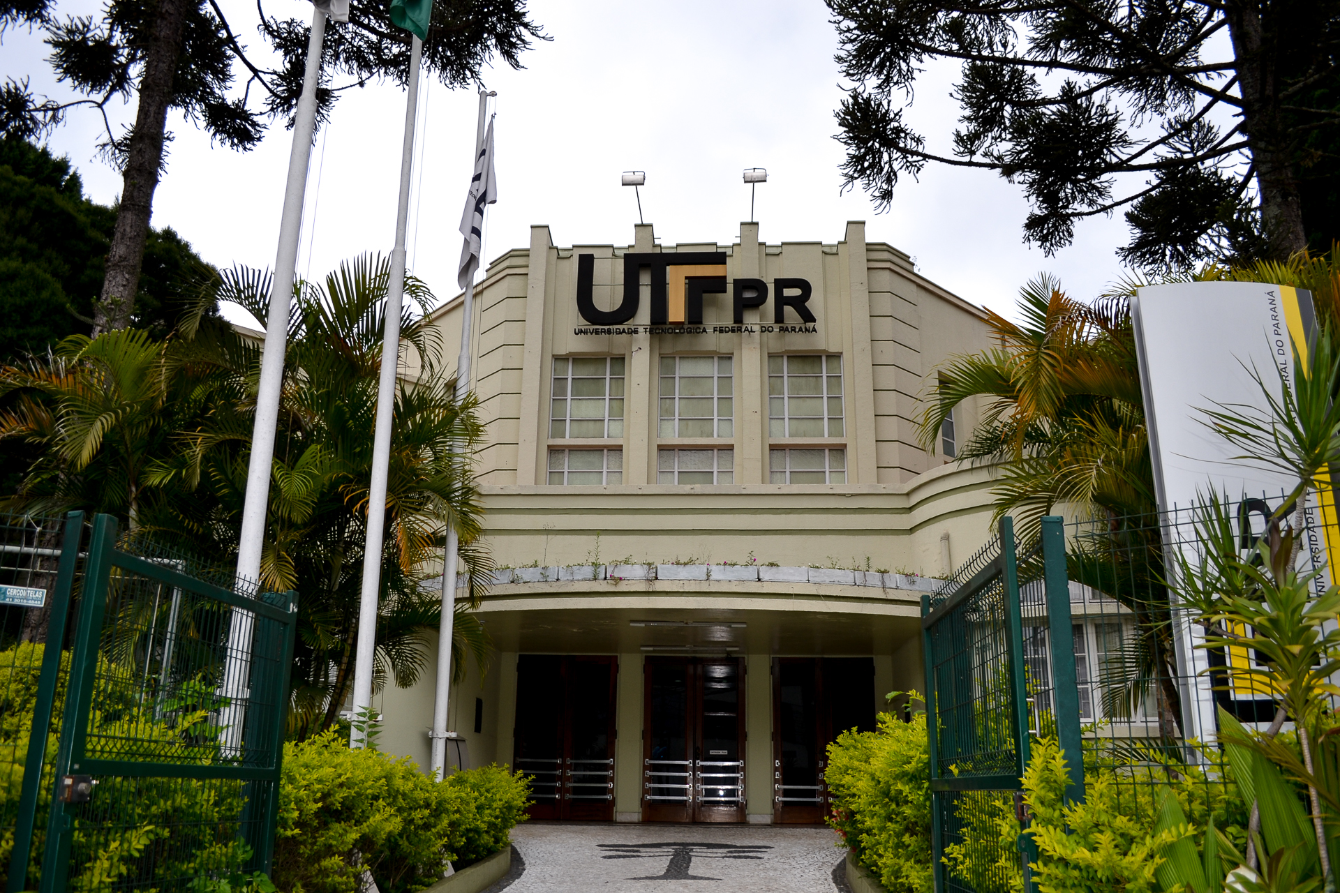 Câmpus Curitiba da Universidade Tecnológica Federal do Paraná (UTFPR).